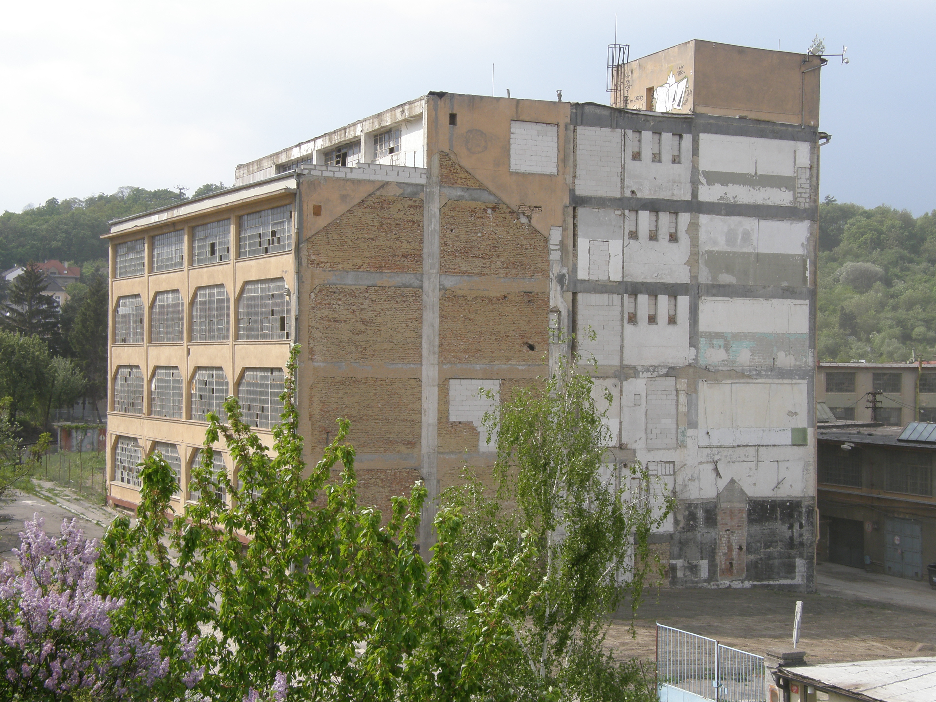 Jediná budova bývalé továrny Walter, která zůstane stát - vznikne v ní muzeum